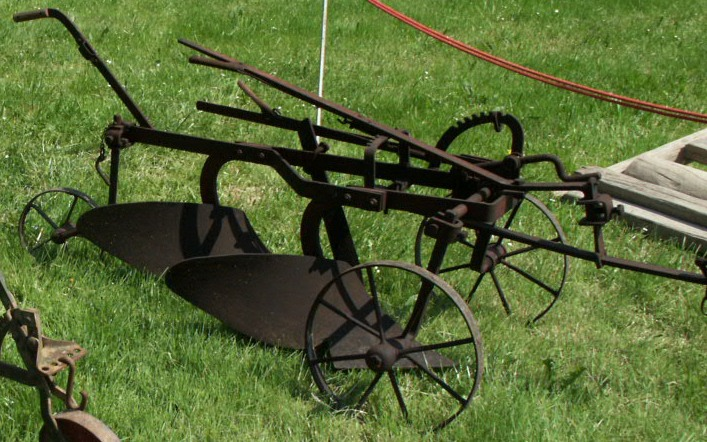 Landwirtschaftliches Gerät